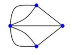 Đồ thị từ bài toán 7 chiếc cầu